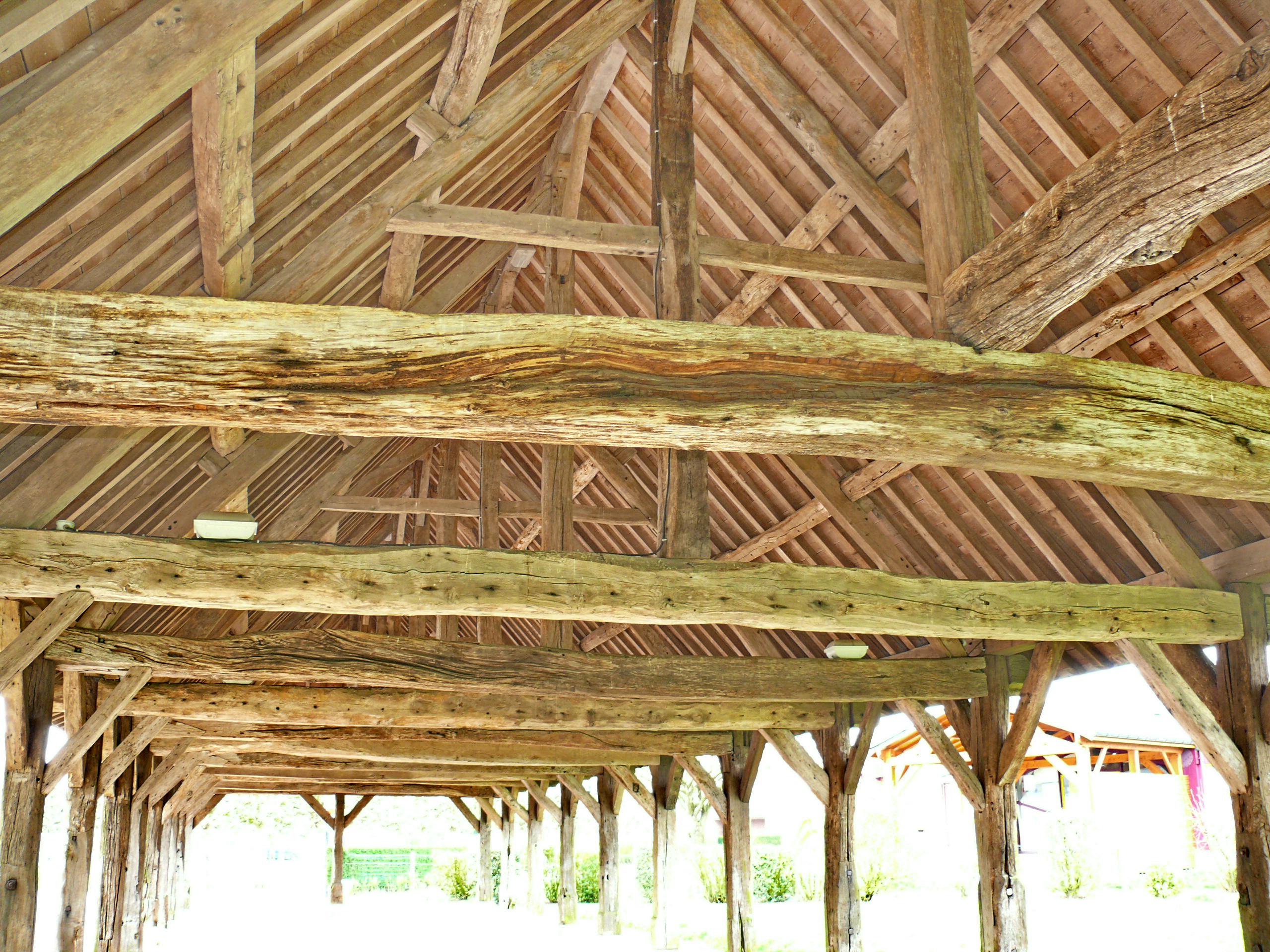 Charpente de la halle de Hornoy-le-Bourg